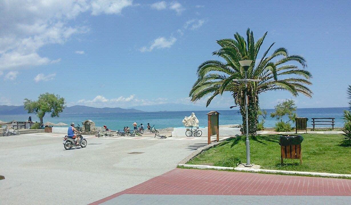 Јерисос